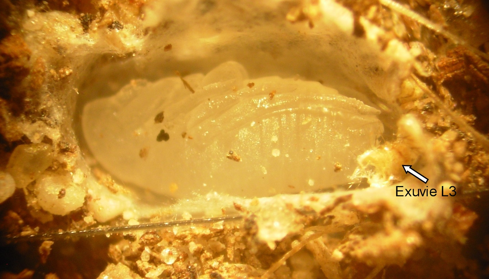 Cocon de puce du chat et du chien(Ctenocephalides felis) ouvert montrant la nymphe (=pupe)